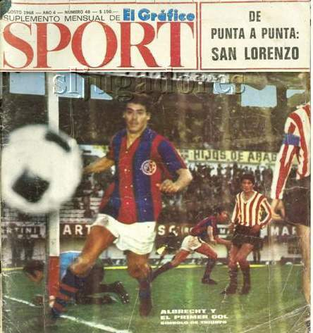 José Albrecht y el primer gol de San Lorenzo en la final del torneo Metropolitano 1968